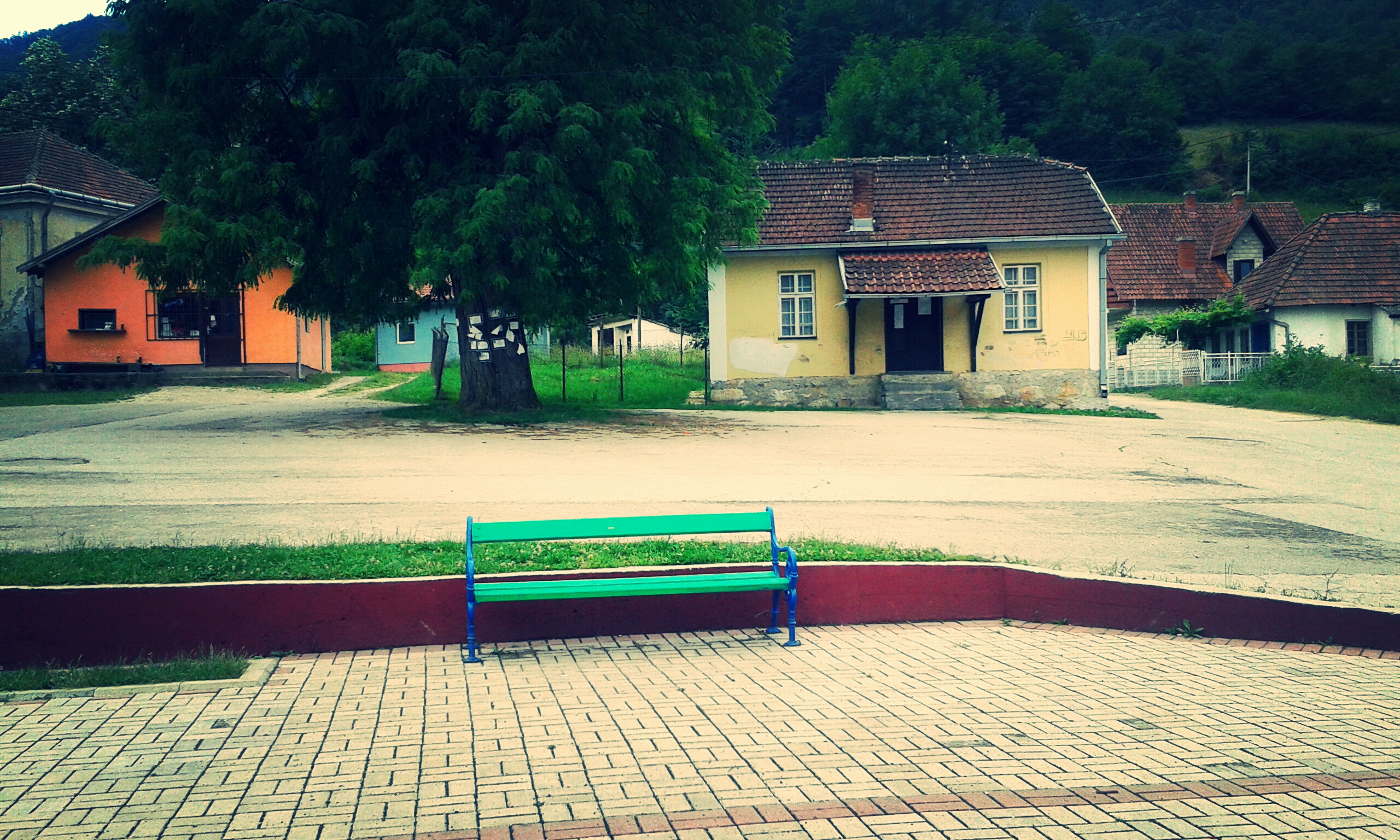 Центар села Крвавци